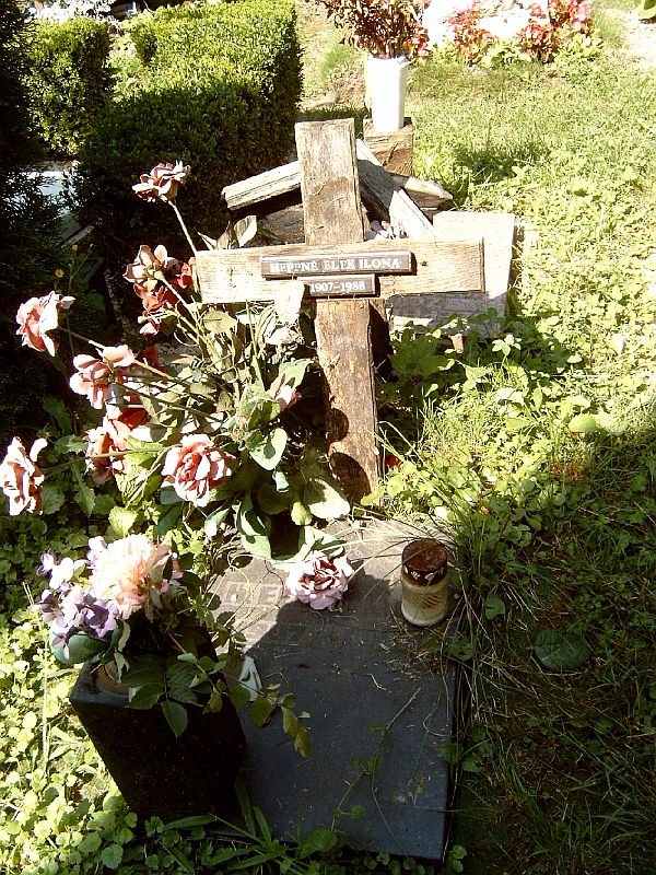 Elek Ilona sírja Budapesten. Farkasréti temető: 60/8-1-591.